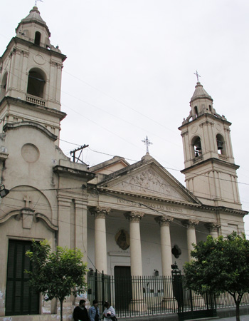 Catedral de ciudad Santiago del Estero en Argentina